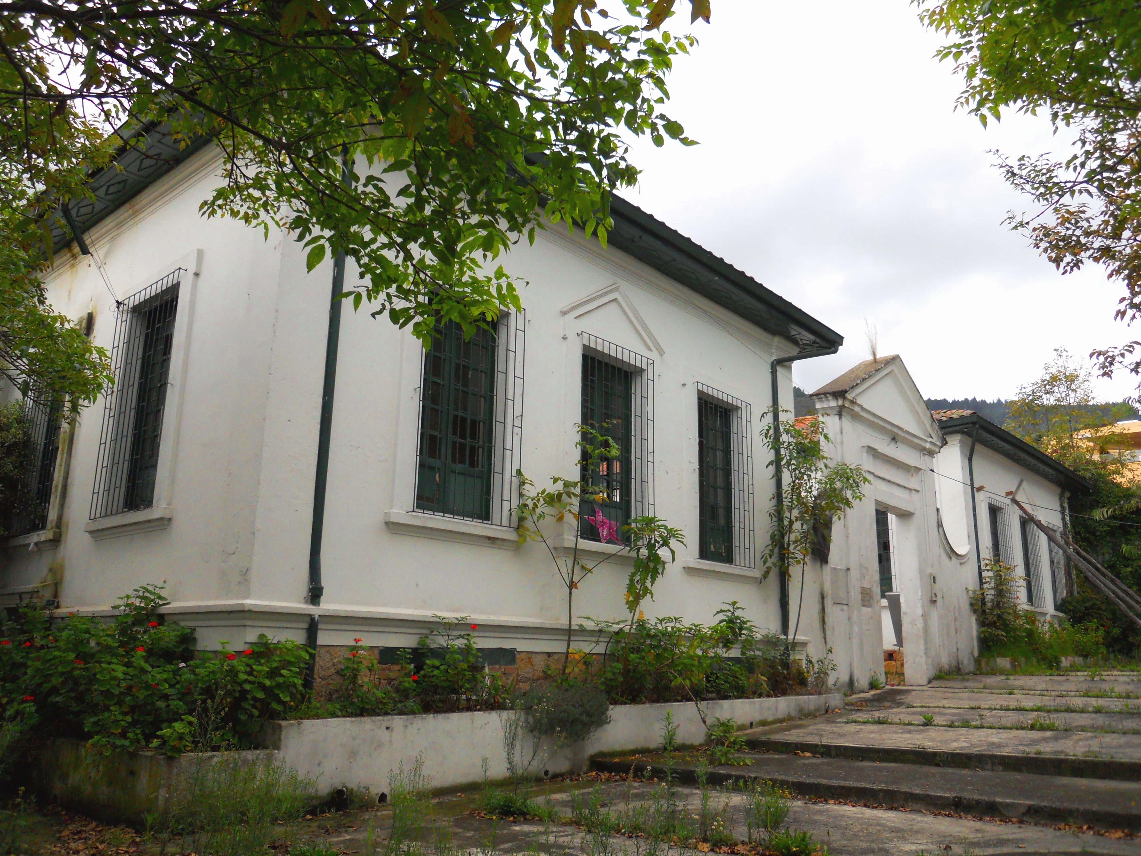 Usaquén Bogotá - Escuela en el costado norte del parque central, calle 119 con carrera Sexta A.